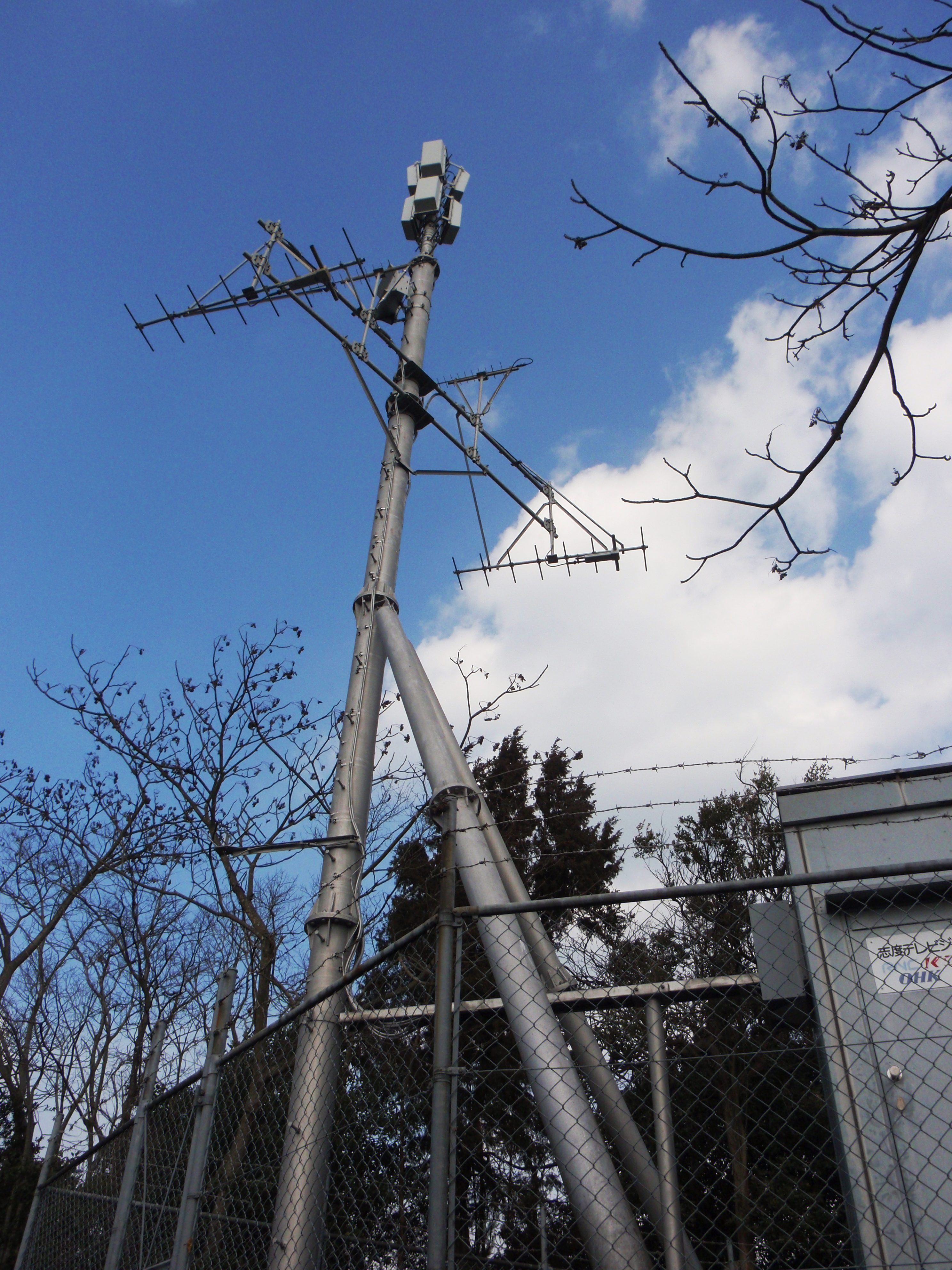 香川県さぬき市にあるRSK・OHK・KSB・RNC・TSCの志度テレビ中継局。